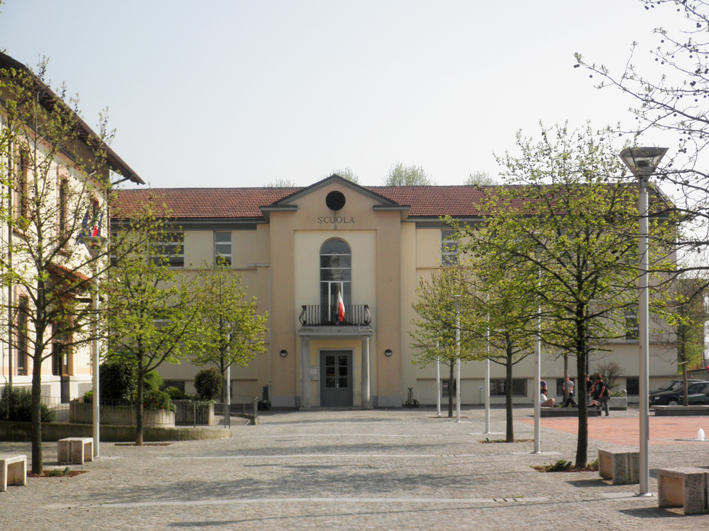 Mulazzano, la scuola elementare Alessandro Manzoni, costruita nel 1930 su progetto di Giovanni Attilio Fugazza.